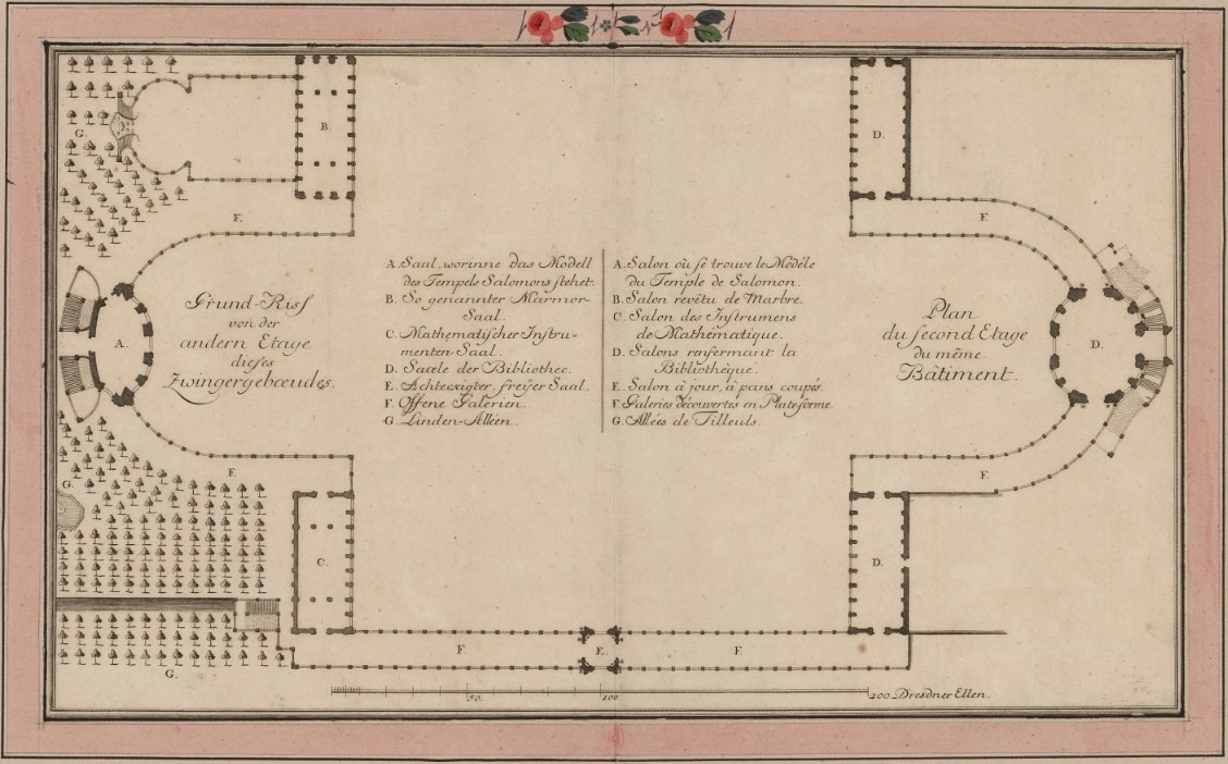 Grundriss des Obergeschosses des Zwingers und seine Nutzung um 1755. Originalname: "Grund-Riss von der andern Etage dieses Zwingergebaeudes". Kupferstich, 28 x 40 cm.